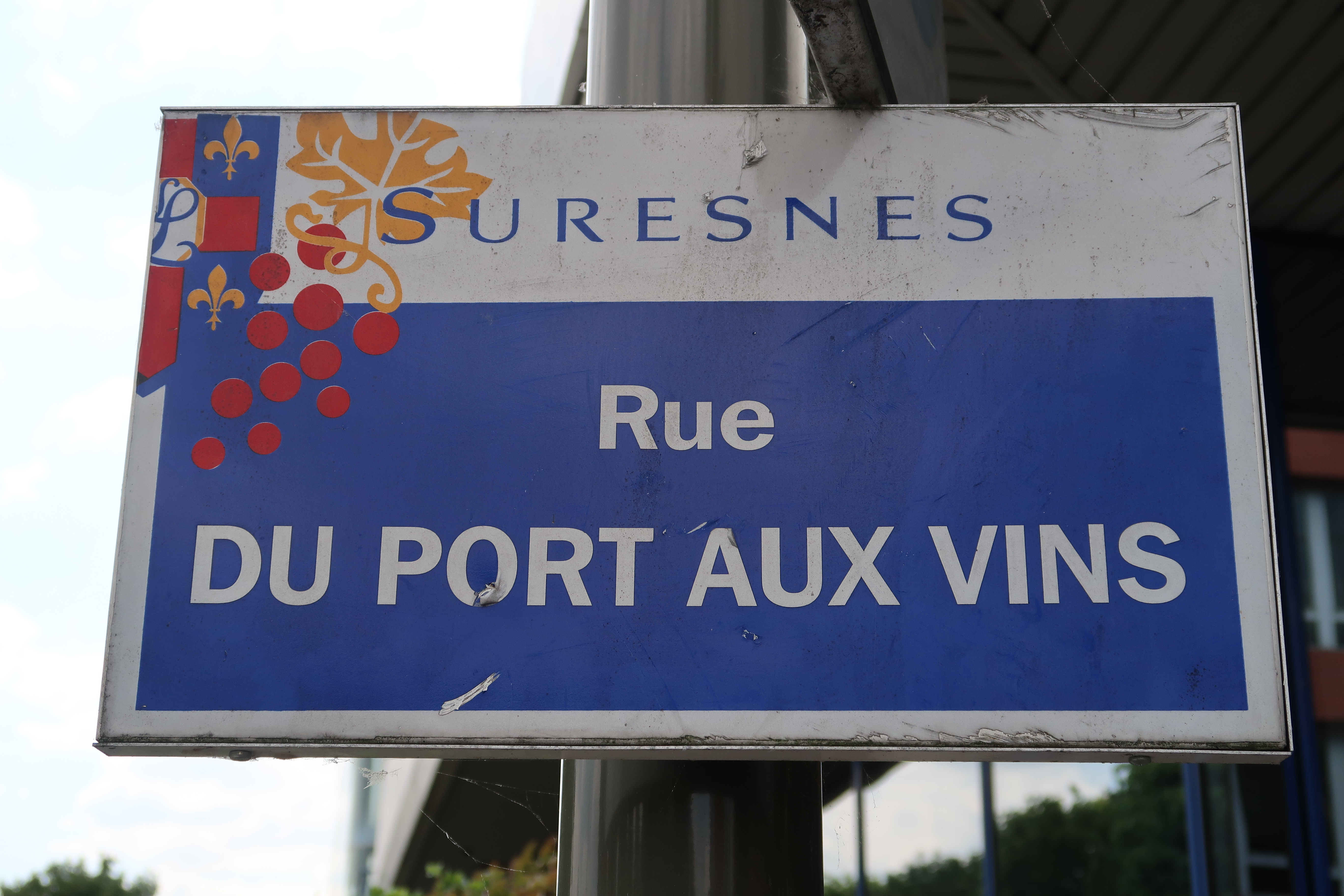 Plaque de la rue du Port-aux-Vins à Suresnes (Hauts-de-Seine).